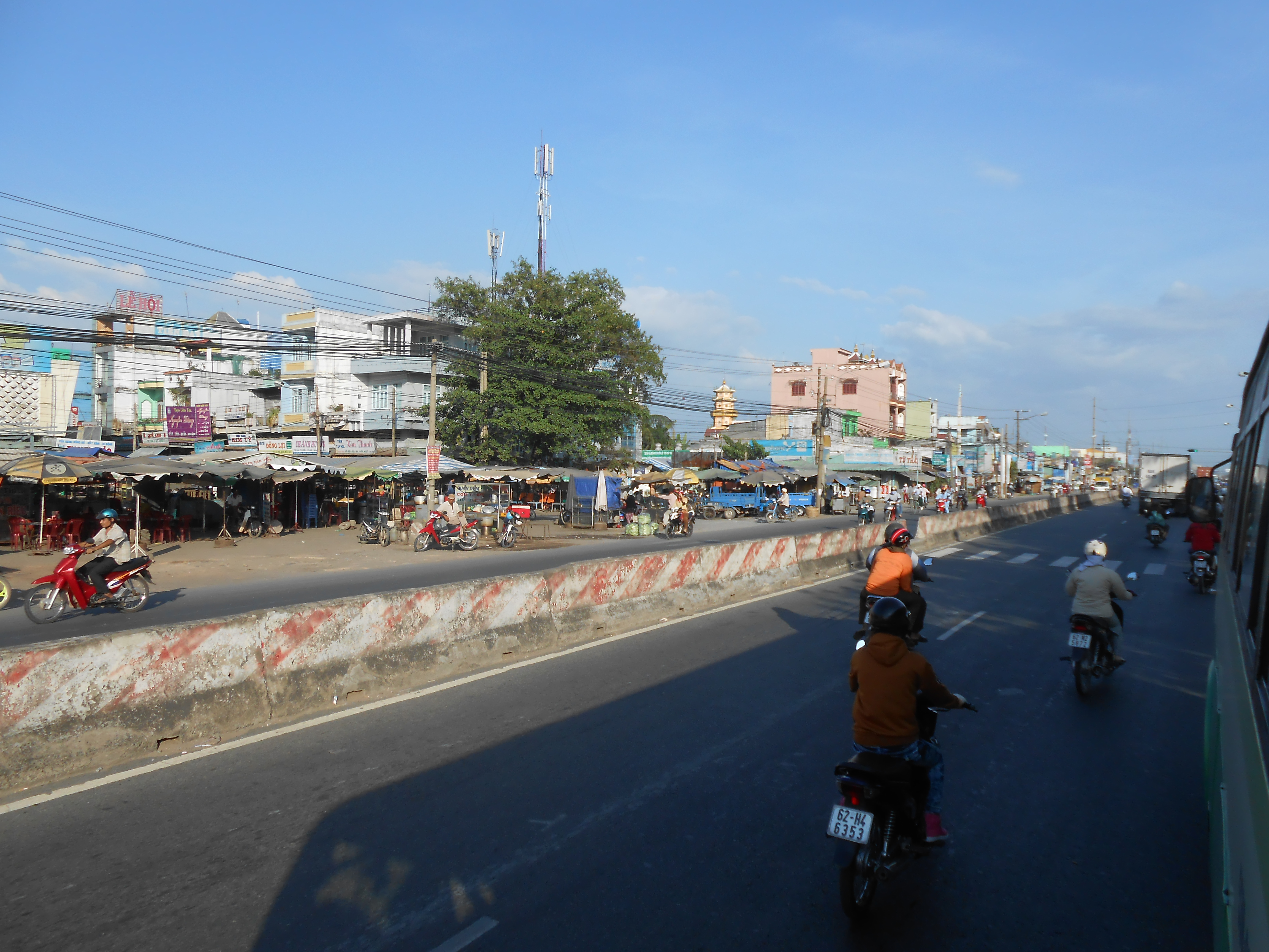 Thị trấn Bến Lức, Long An